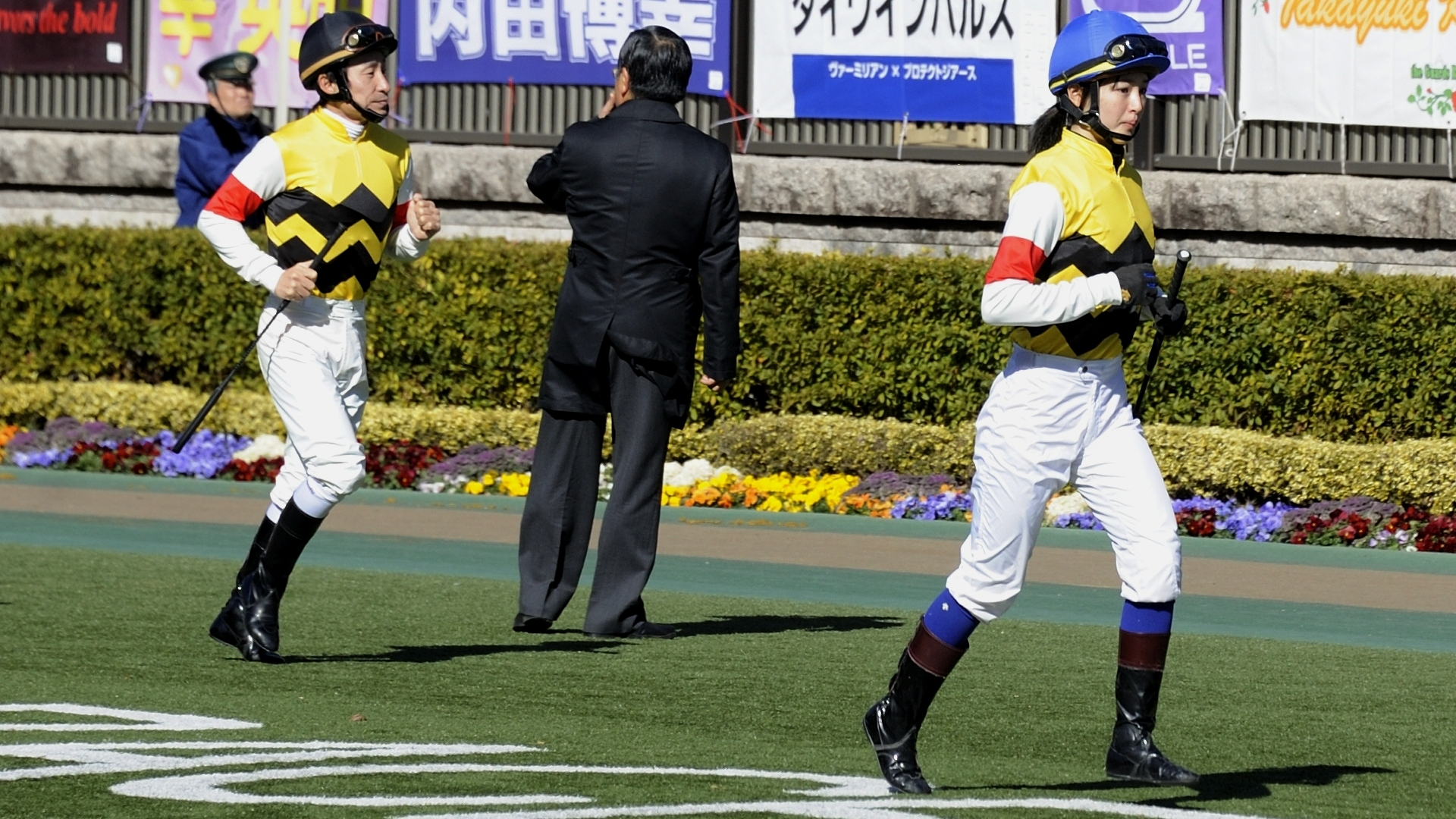 2017年2月19日、東京競馬場1Rで騎乗する横山典弘騎手と藤田菜七子騎手。二人の勝負服は同一である。